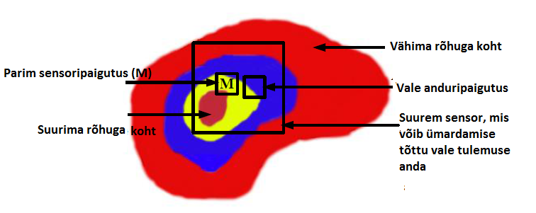 Rõhuanduri paigutusest